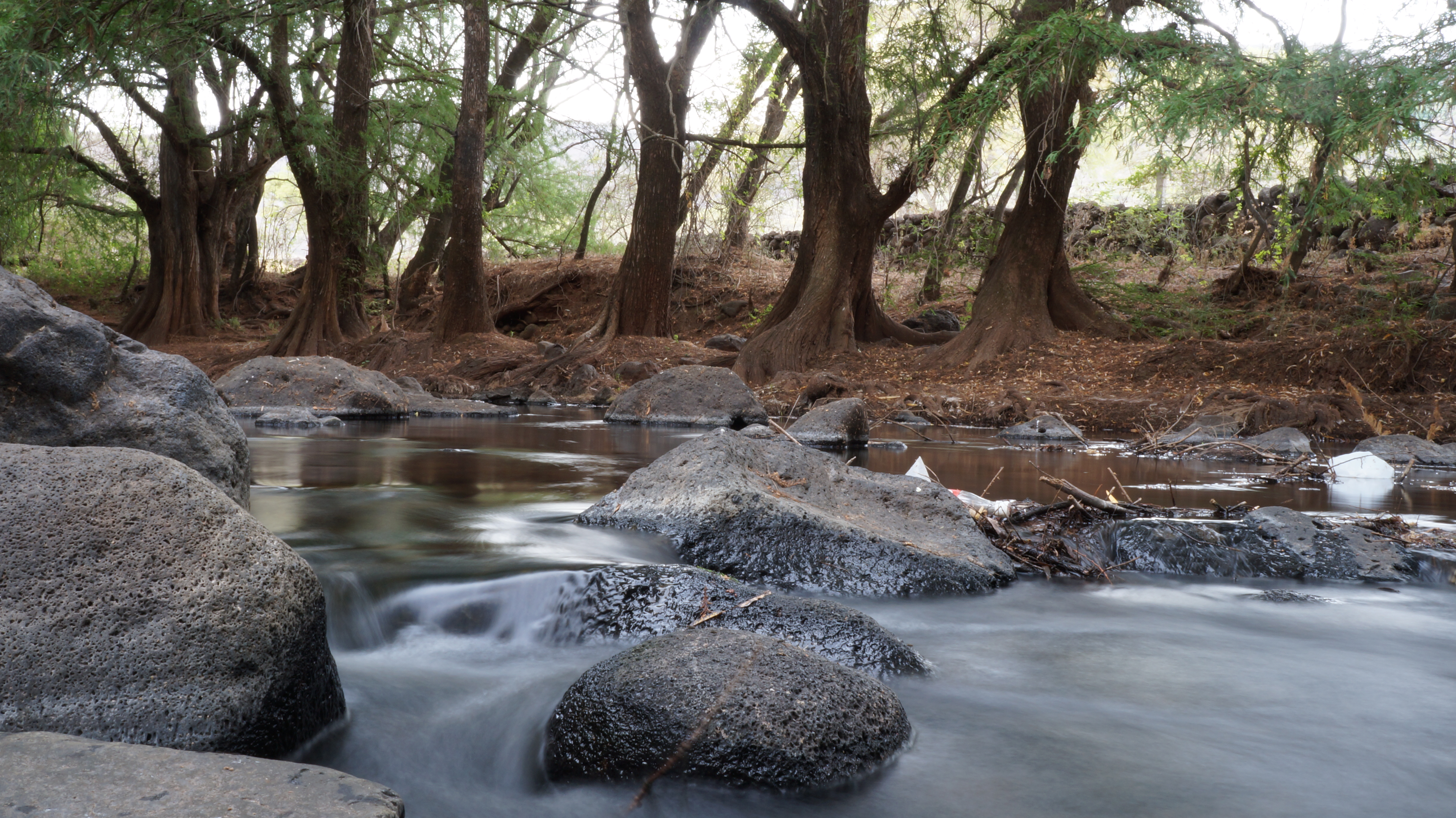 Para pasar una tarde apacible este parque ofrece el espacio ideal.